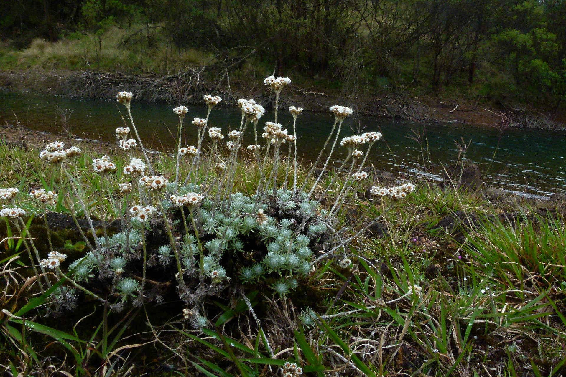 Anaphalis wightiana. Mukurthi, India